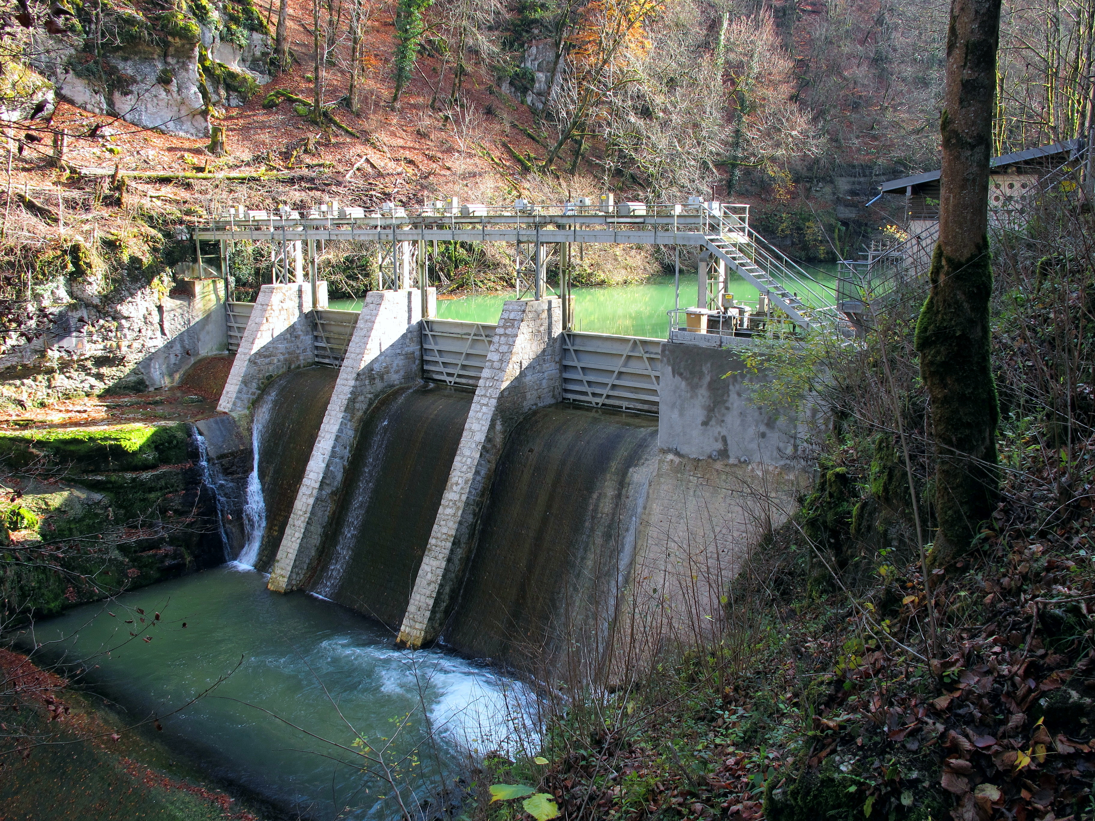 Le barrage sur la Loue dans les gorges de Nouailles